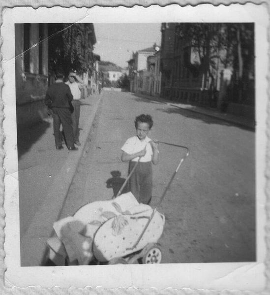 Pe strada Haiducul Bujor, Bucuresti - 1959 O strada disparuta de pe harta Bucurestului; facea conectia intre strada Olteni (in fata) si Calea Vacaresti.